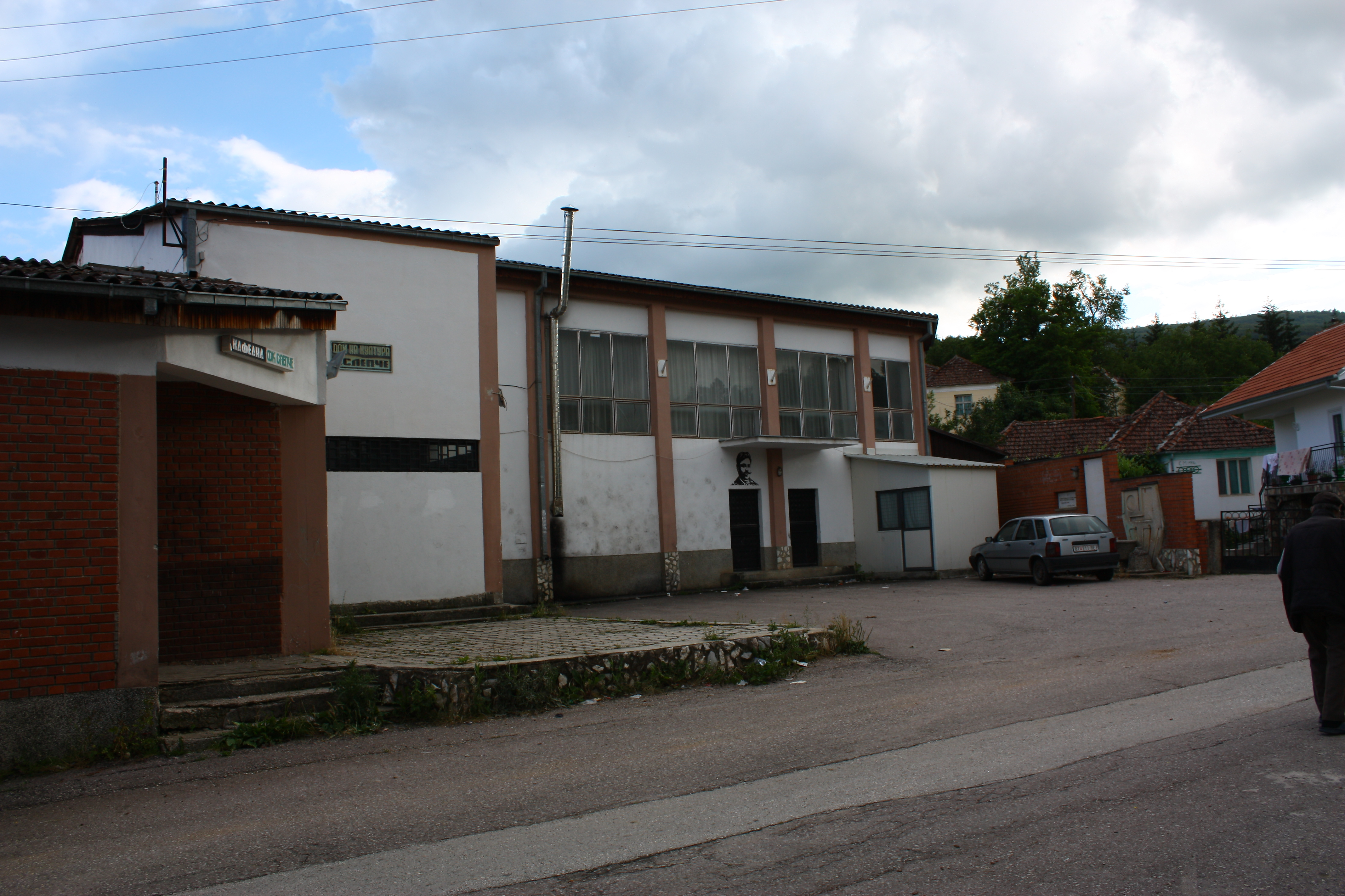 Домот на културата во село Слепче, Демирхисарско